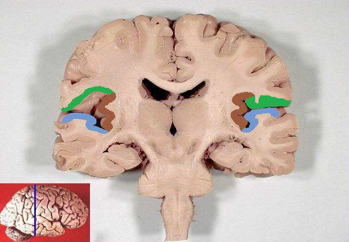 Human brain frontal (coronal) section parietal operculum temporal operculum insular cortex